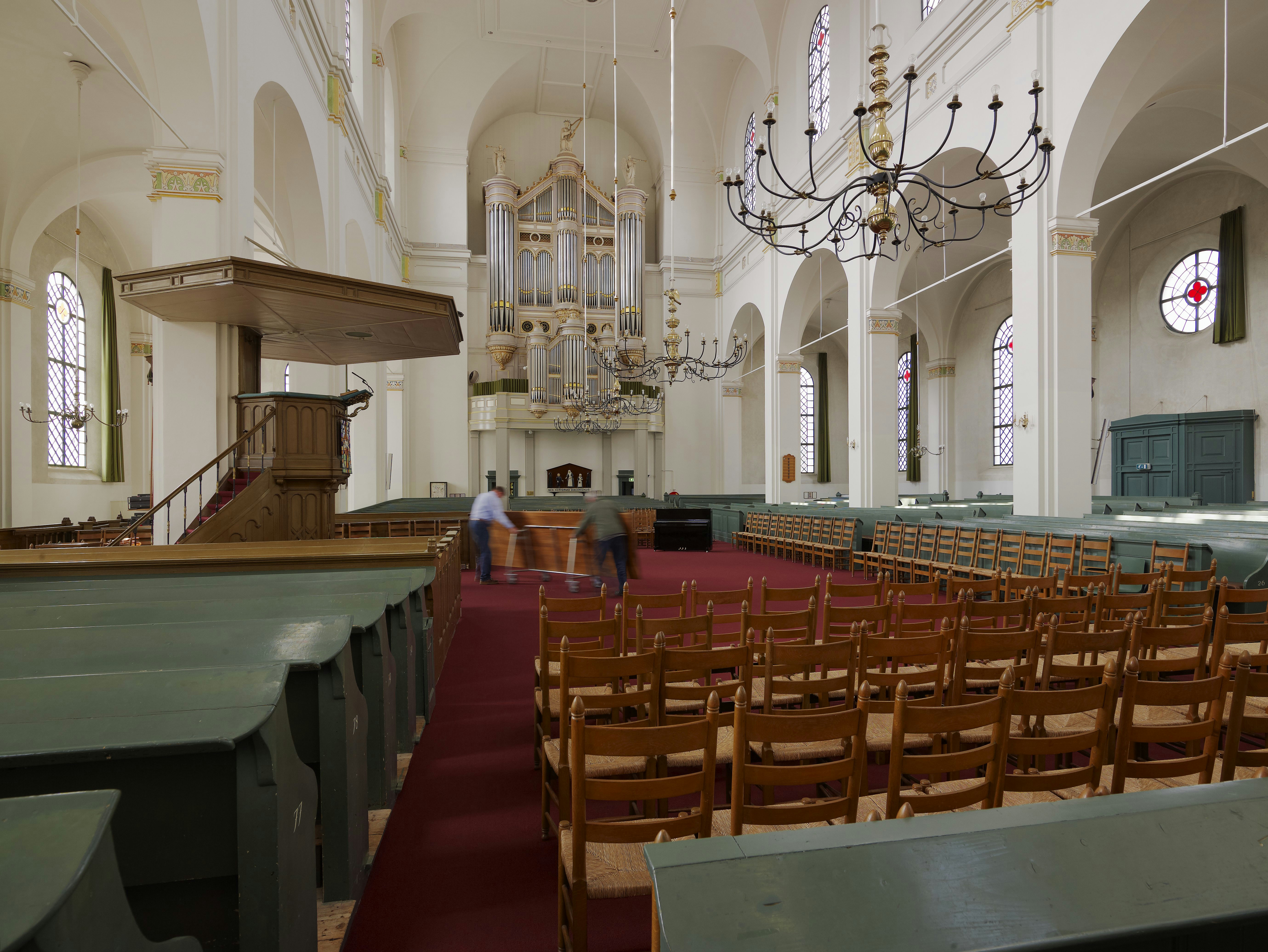 Grote kerk: Interieur, overzicht naar het westen met orgel